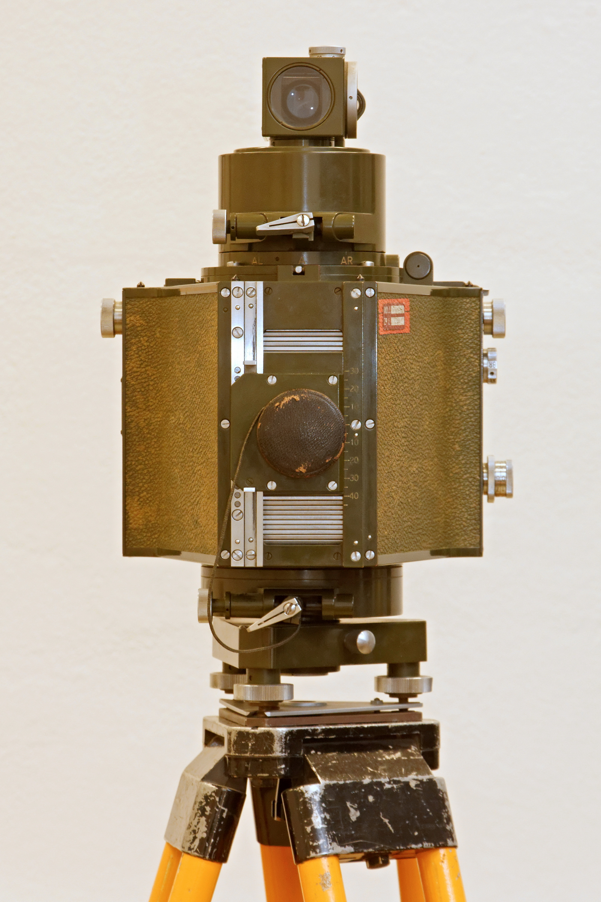 Fototeodolit VEB Carl Zeiss Jena Photheo 19/1318, pohled zpředu.